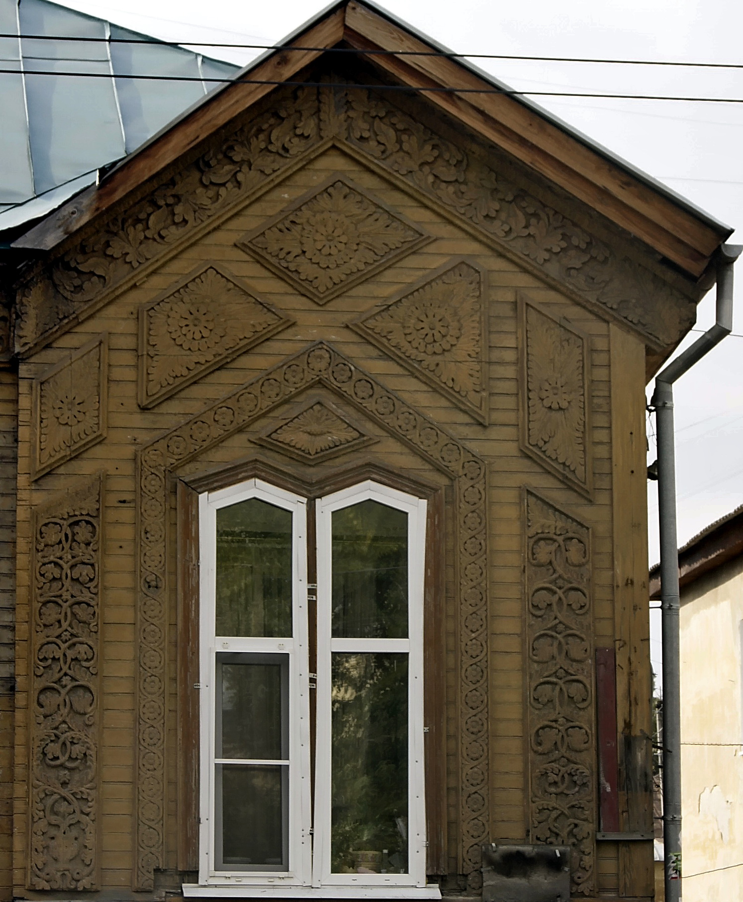 Дом жилой (Климова П.Д.): улица Большая Печерская, 35, Нижний Новгород, Нижегородская область